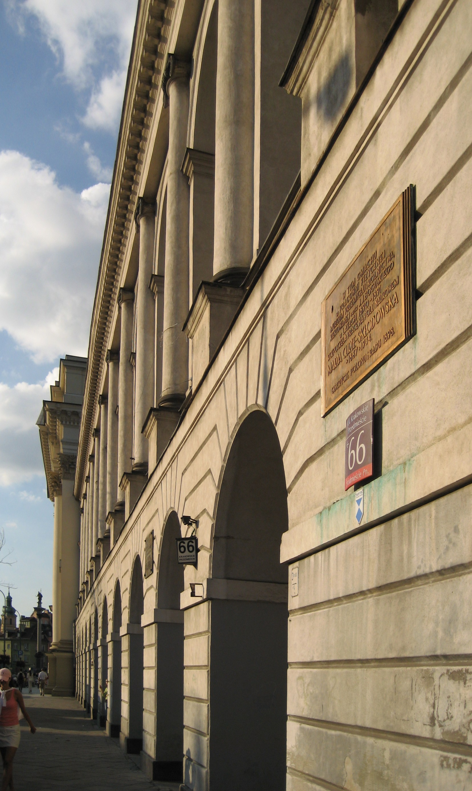 Krakowskie Przedmiescie 66, Warsaw. At a lab here, Maria Sklodowska-Curie did her first scientific work (1890-91).